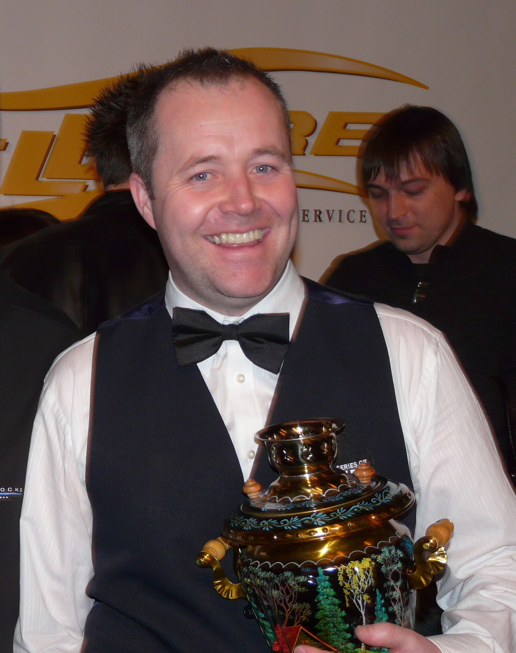 Туринир World Series of Snooker в Москве